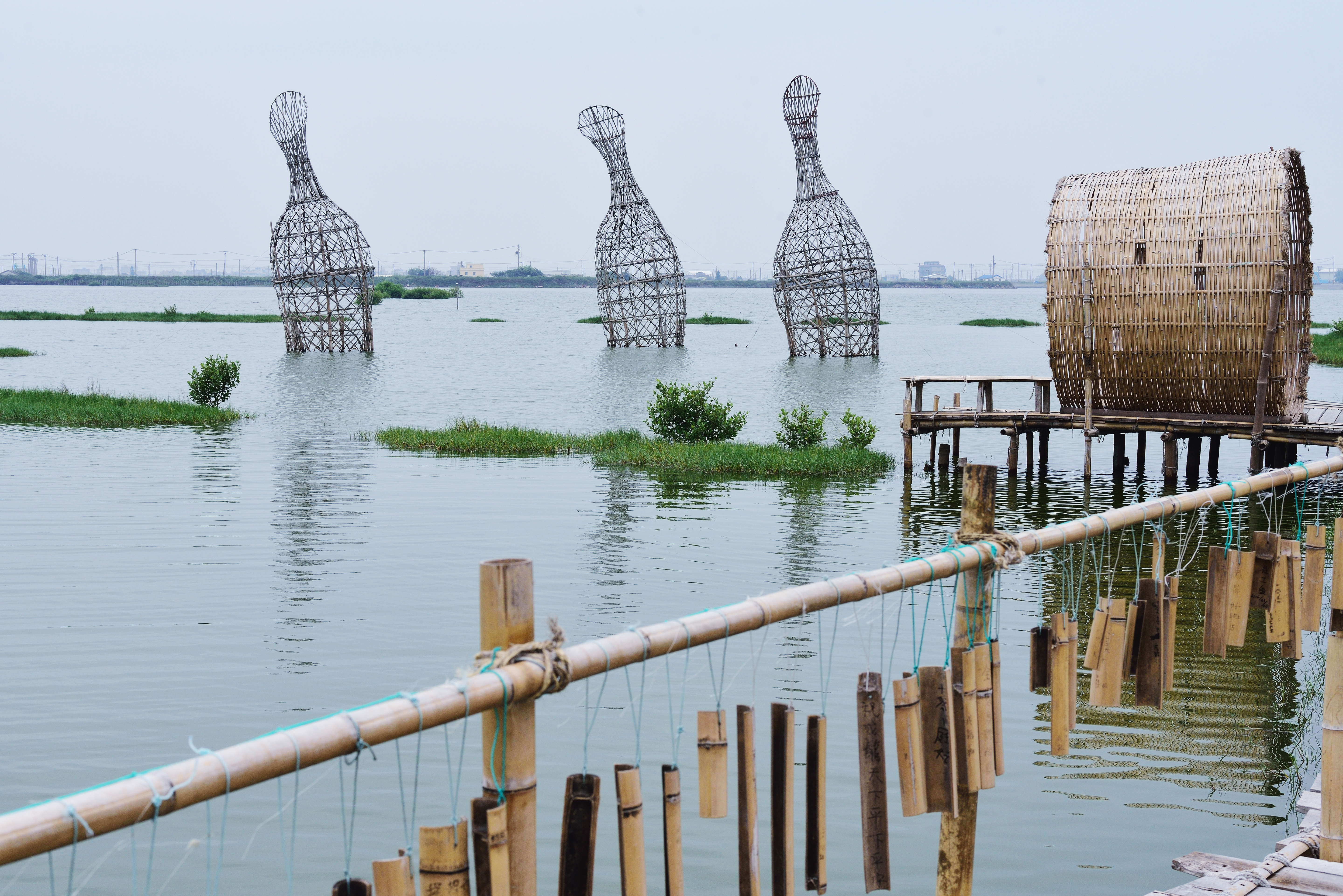 11-雲林成龍溼地